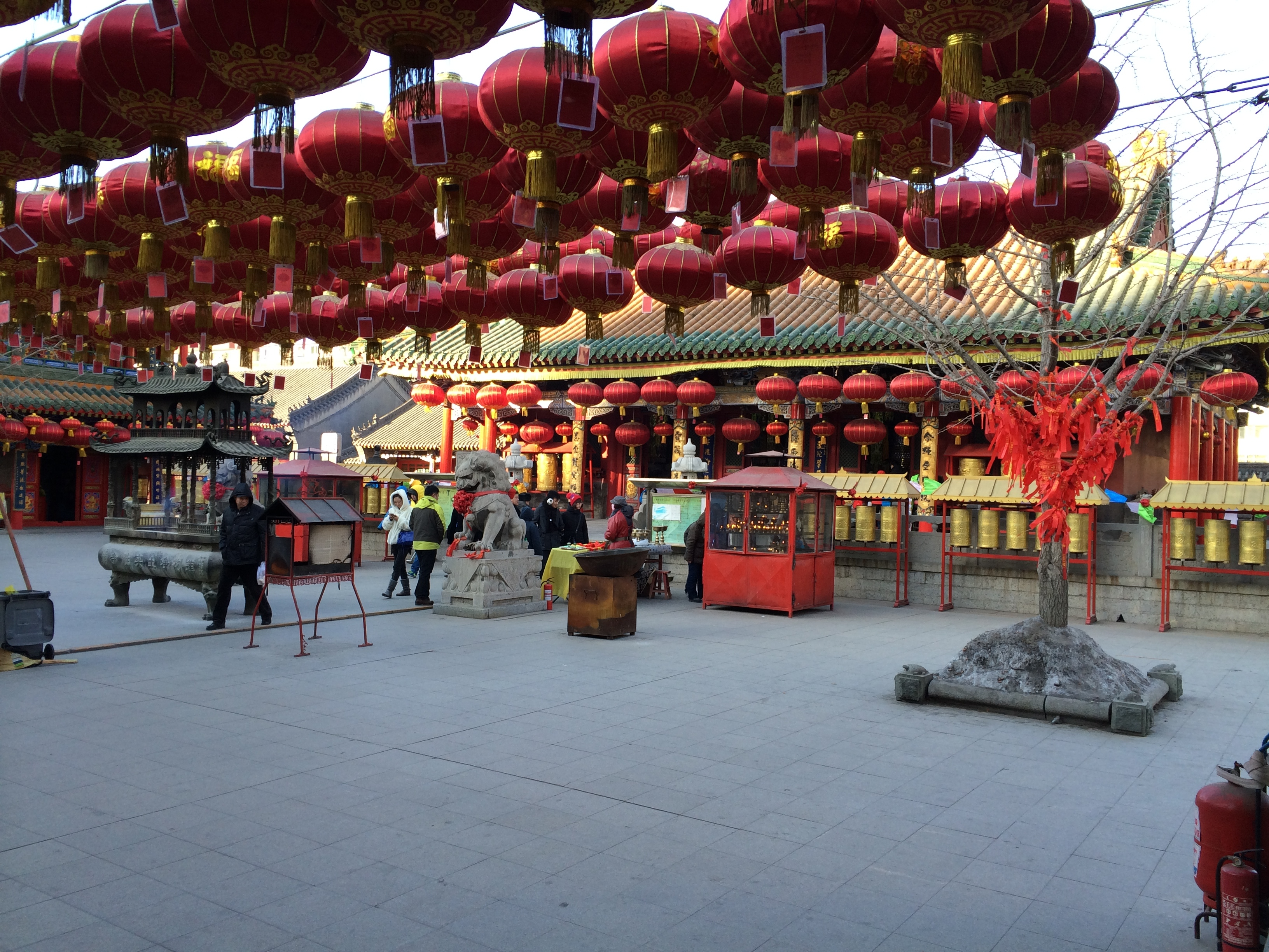 中文（中国大陆）: 沈阳皇寺庙会